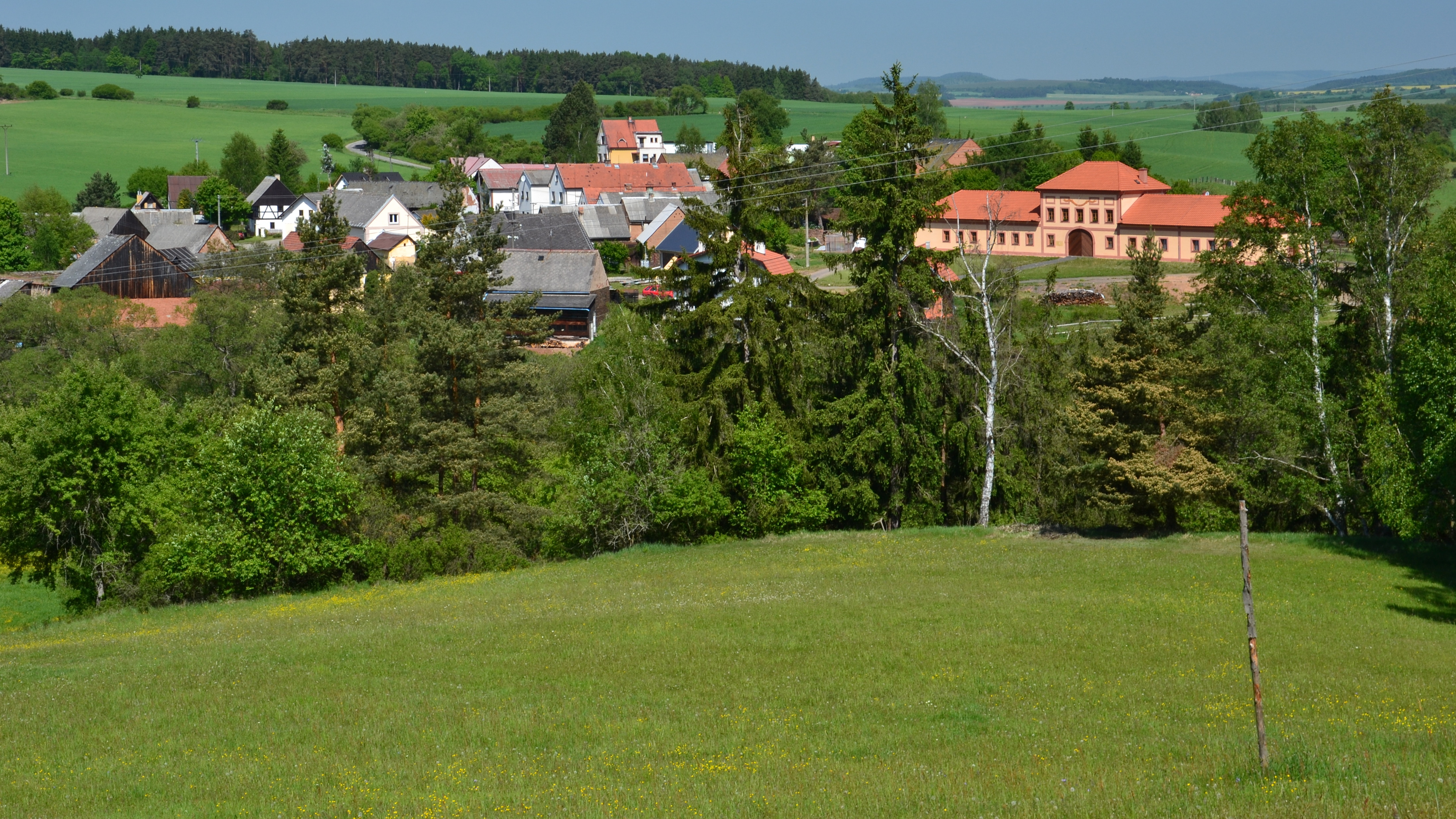 Celkový pohled na Hrádek od jihovýchodu